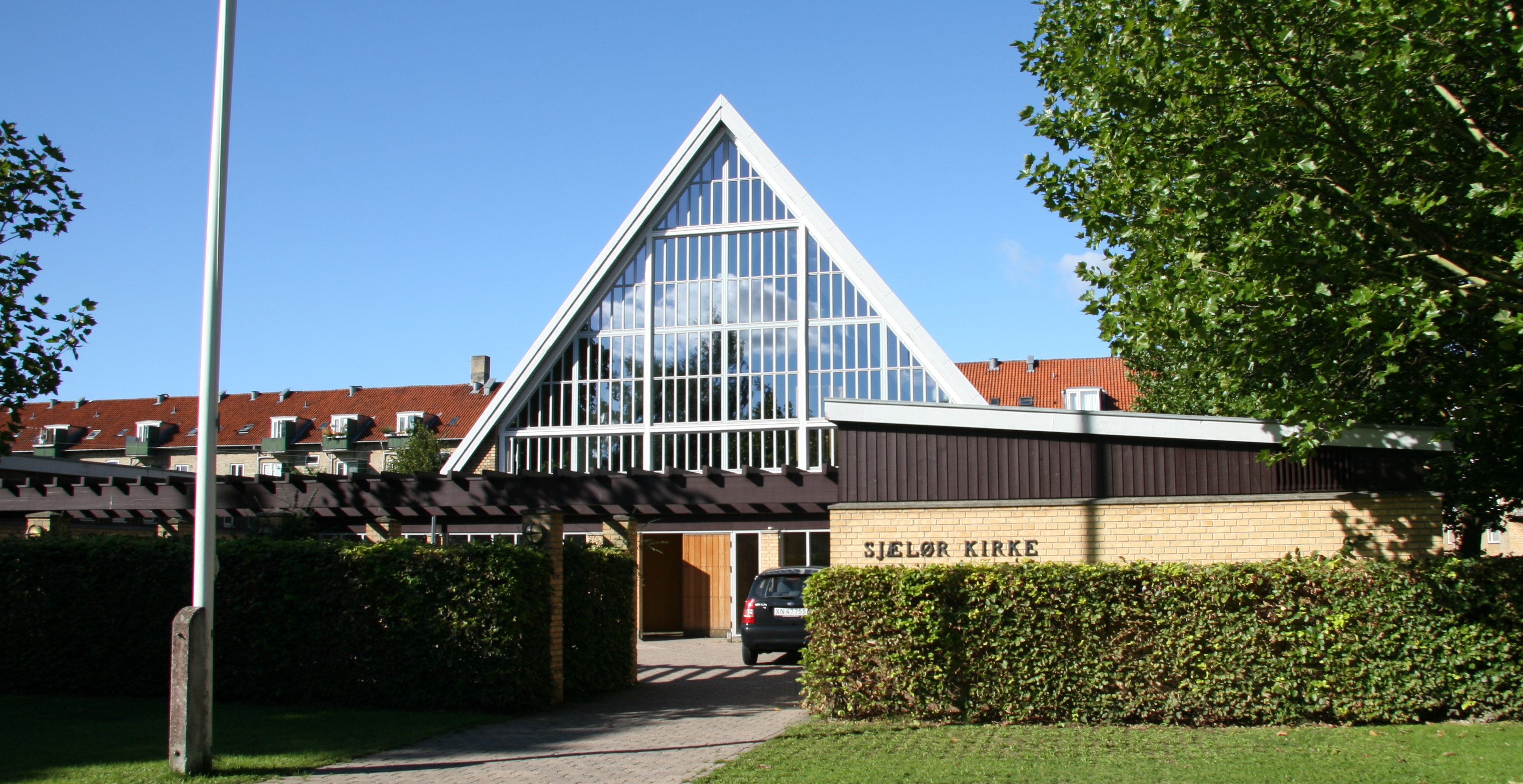 Sjælør Kirke in Copenhagen, Denmark. Exterior